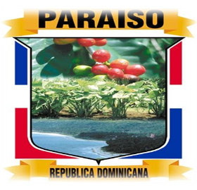 Escudo de Paraíso (from Paraíso Mi Pueblo), Barahona From File:Paraíso Mi Pueblo.pdf